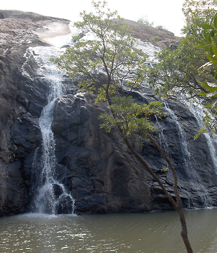 Foto da Cascata, atracção turística da Vila da Namaacha, Moçambique